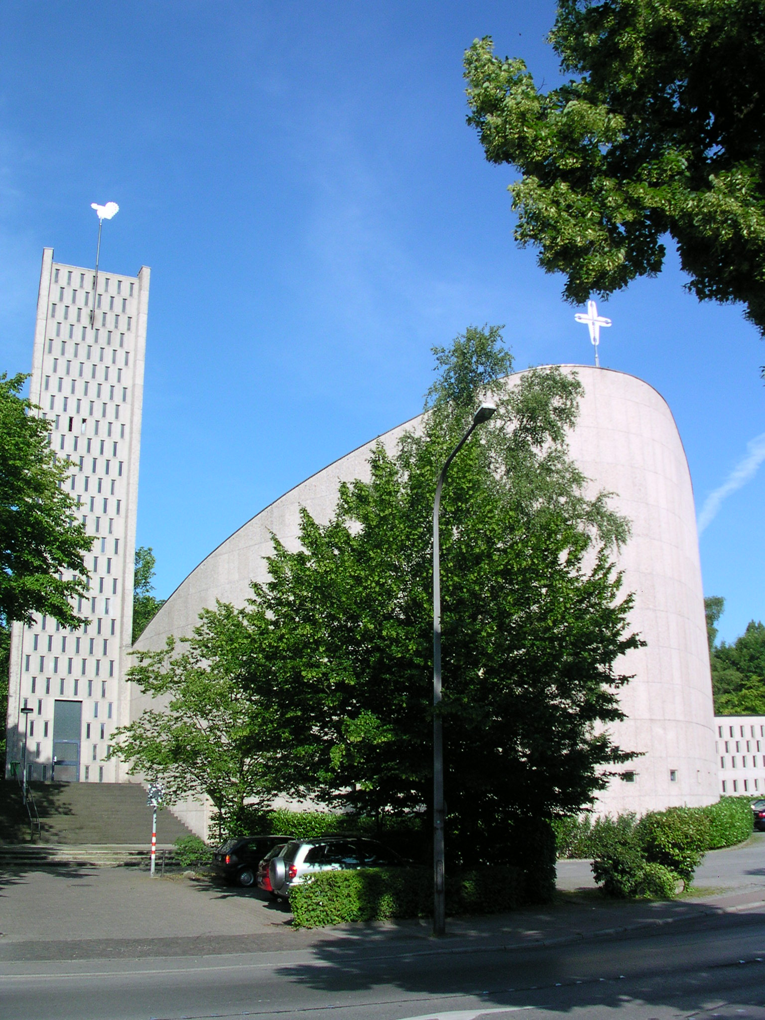 katholische Gregoriuskirche am Jahnplatz in Aachen, 1967 eingeweiht, Architekt Stefan Leuer. Interessant ist die Hanglage, die zwei Kulträume übereinander ermöglicht, unten einen kleinen intimen, ober einen großen. Die kleinen Fenster sind innen mit Texten in Blindenschrift versehen.